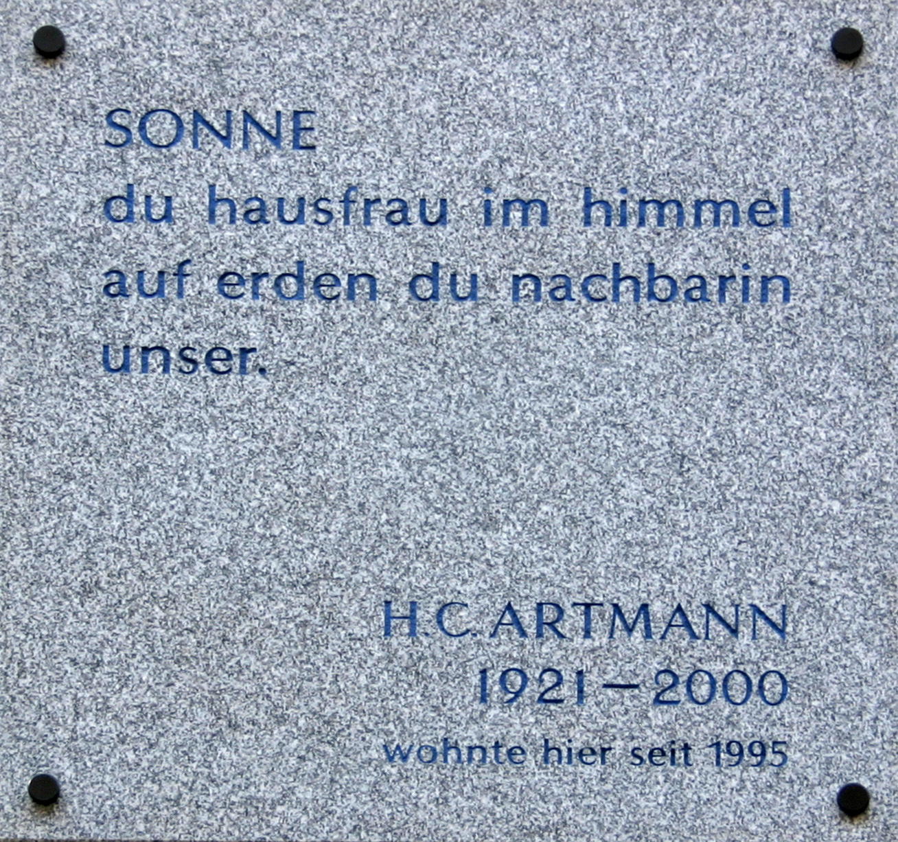 Josefstadt in Wien